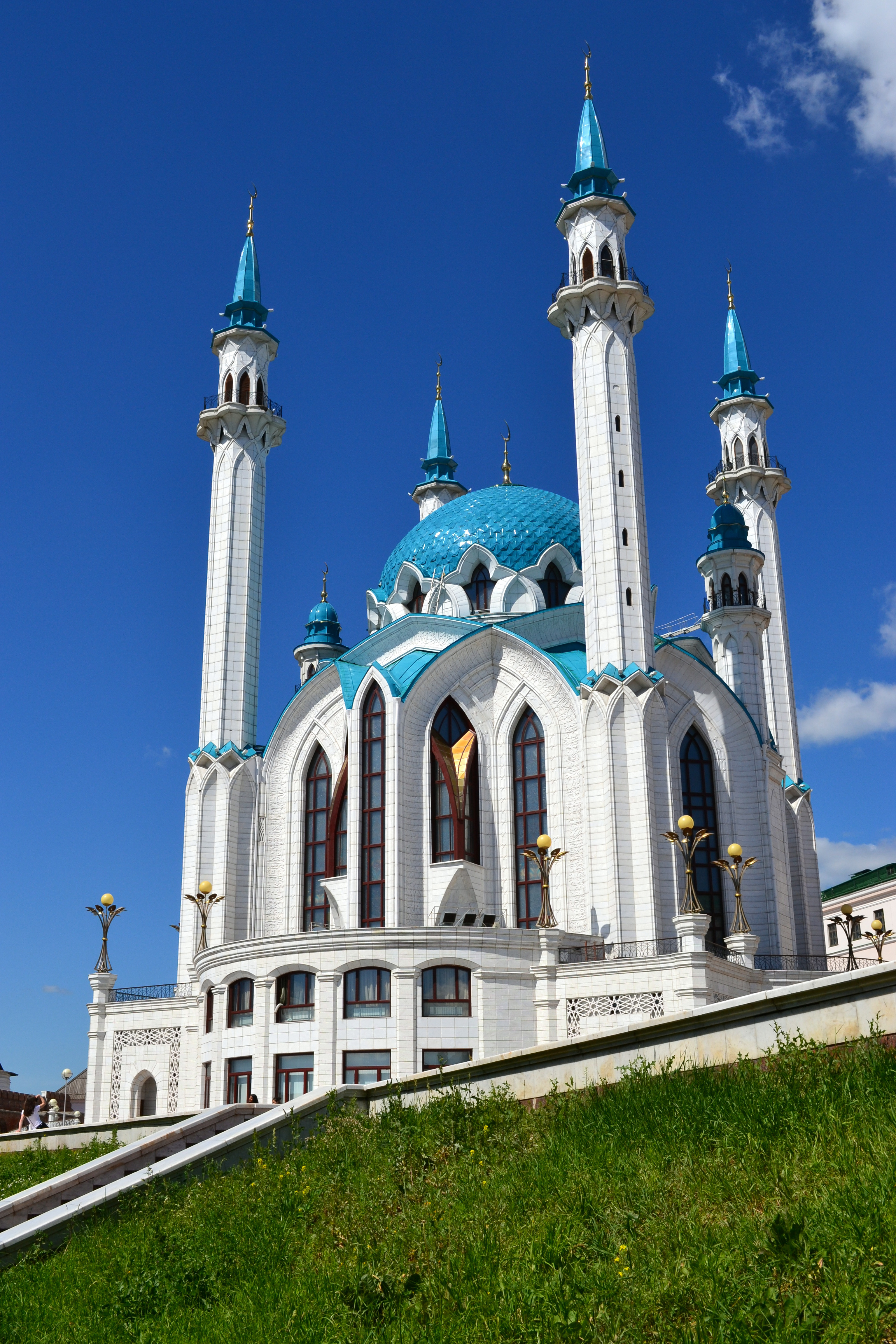 Ансамбль Казанского Кремля (Государственный историко-архитектурный и художественный музей-заповедник «Казанский Кремль») (Республика Татарстан, Казань, Кремль)